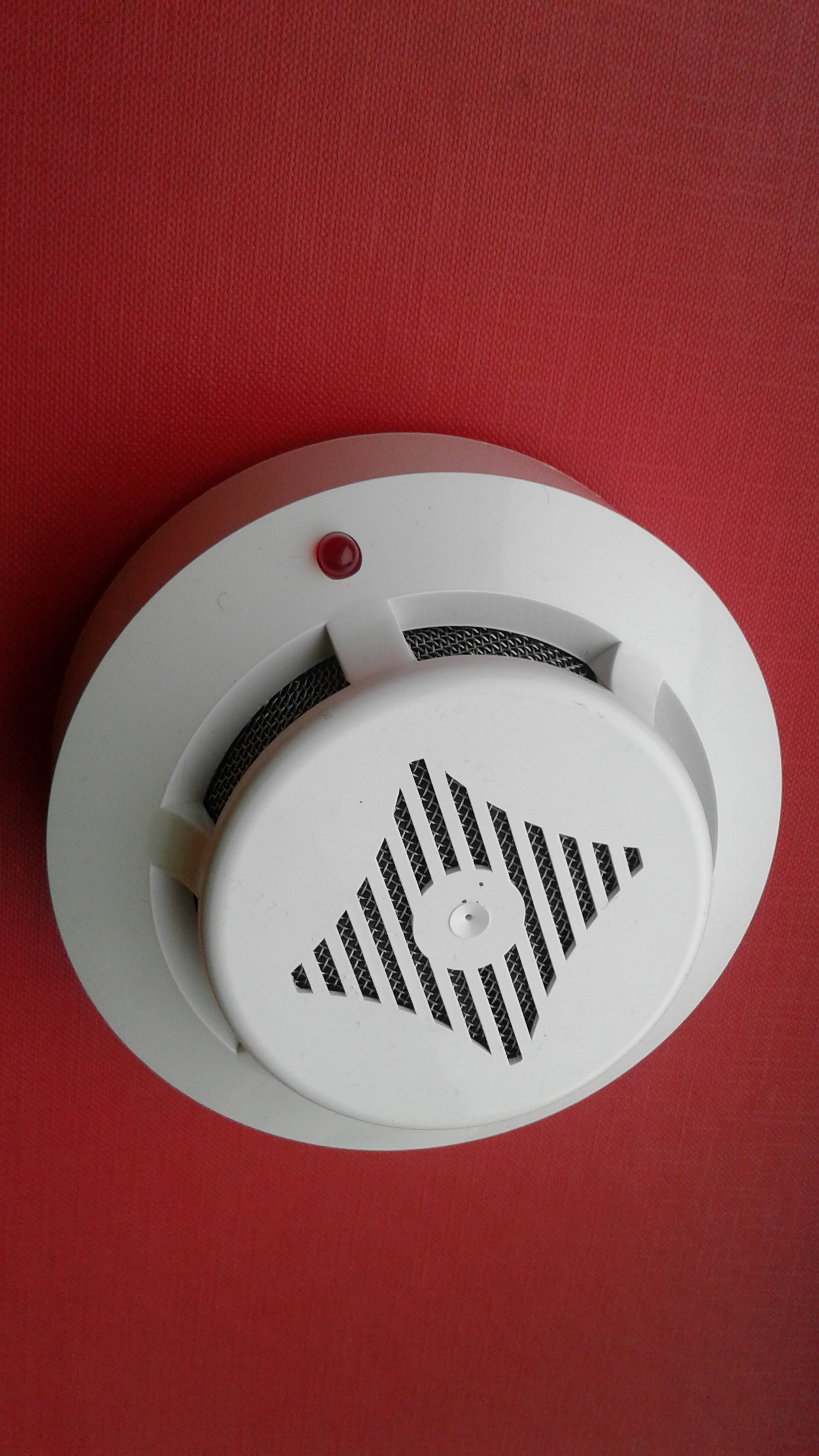 Димовий сповіщувач вітчизняний